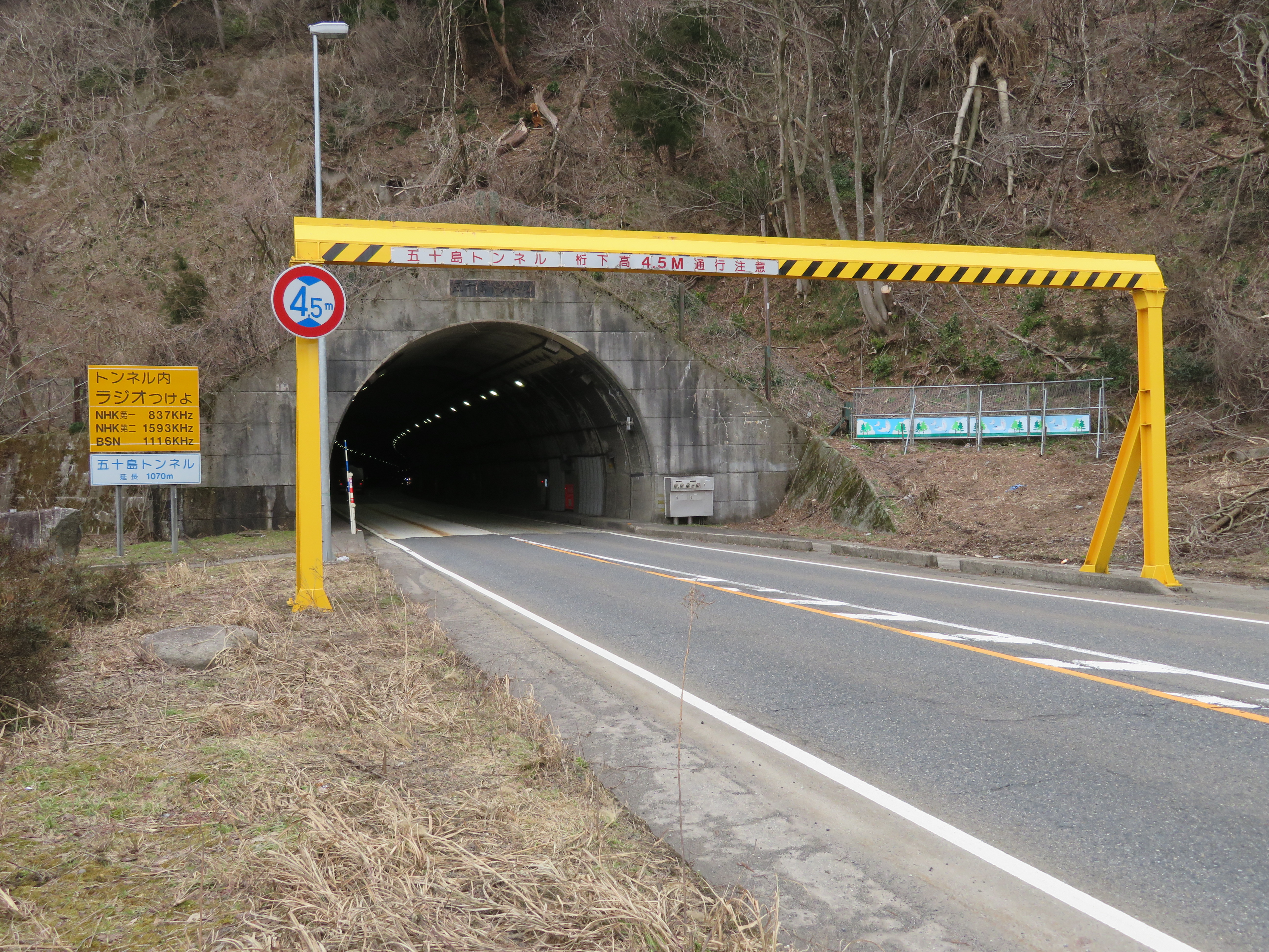 国道49号線五十島トンネル（西会津方面側坑口から撮影）